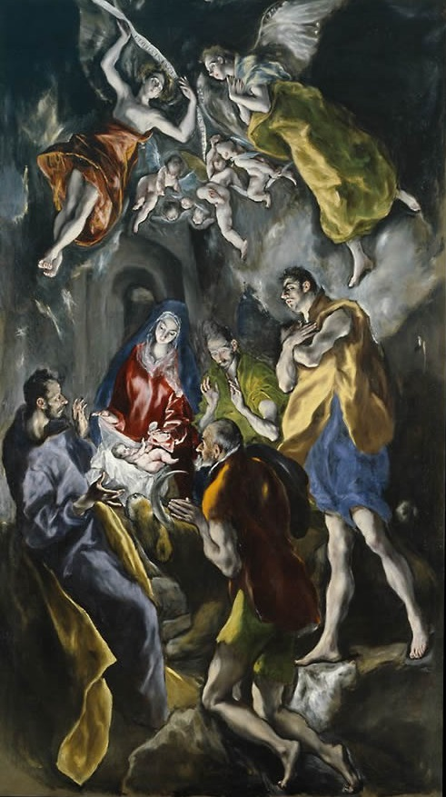 La obra representa el momento en que el Niño Jesús fue adorado por los pastores poco después de su nacimiento y en presencia de sus padres.